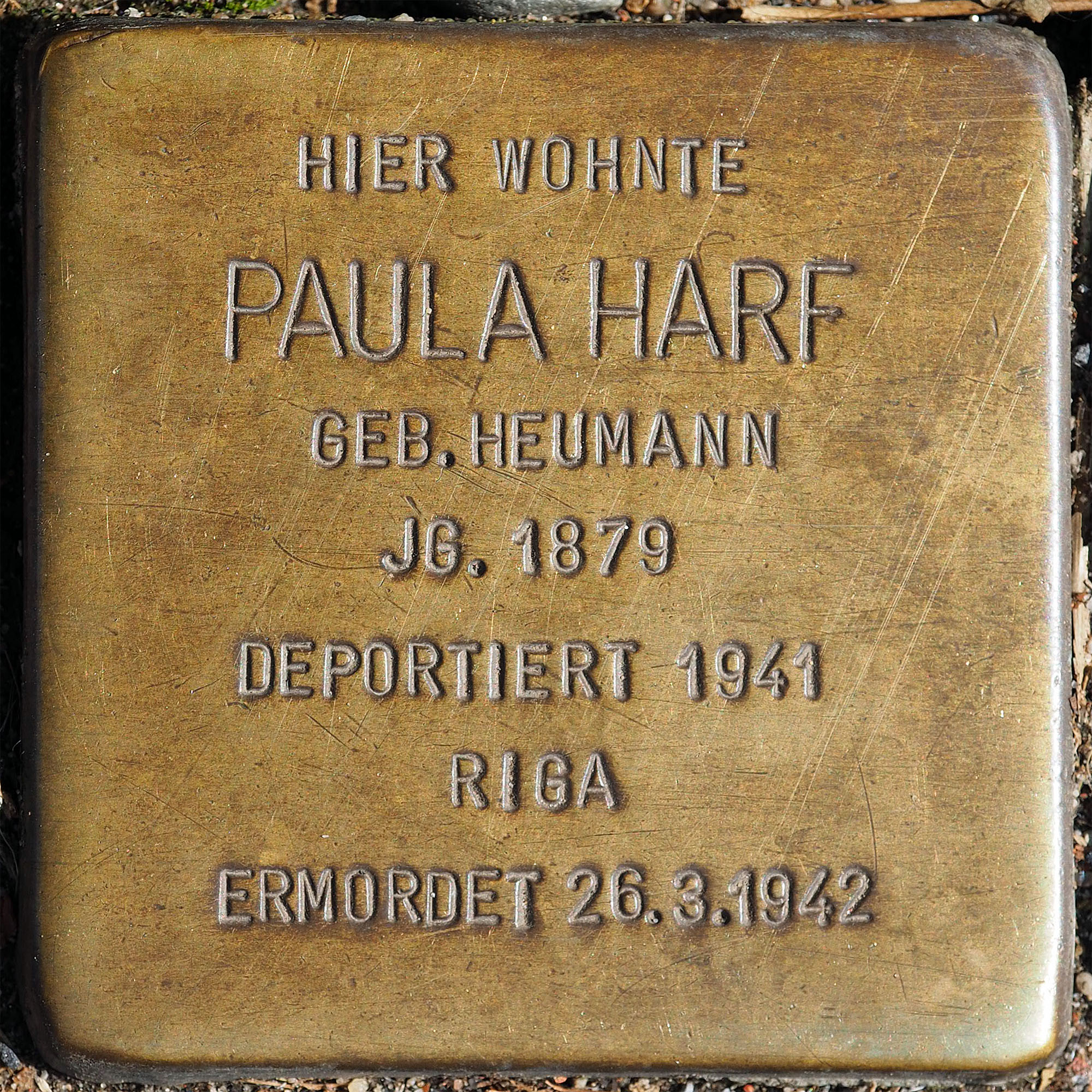 Stolpersteine MG: Harf, Paula